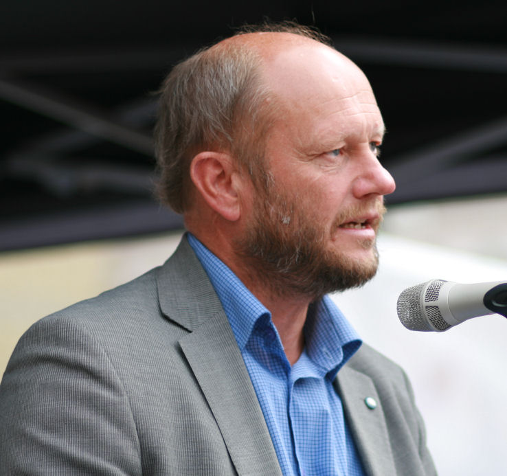 Stein Lier Hansen leader Norsk Industri